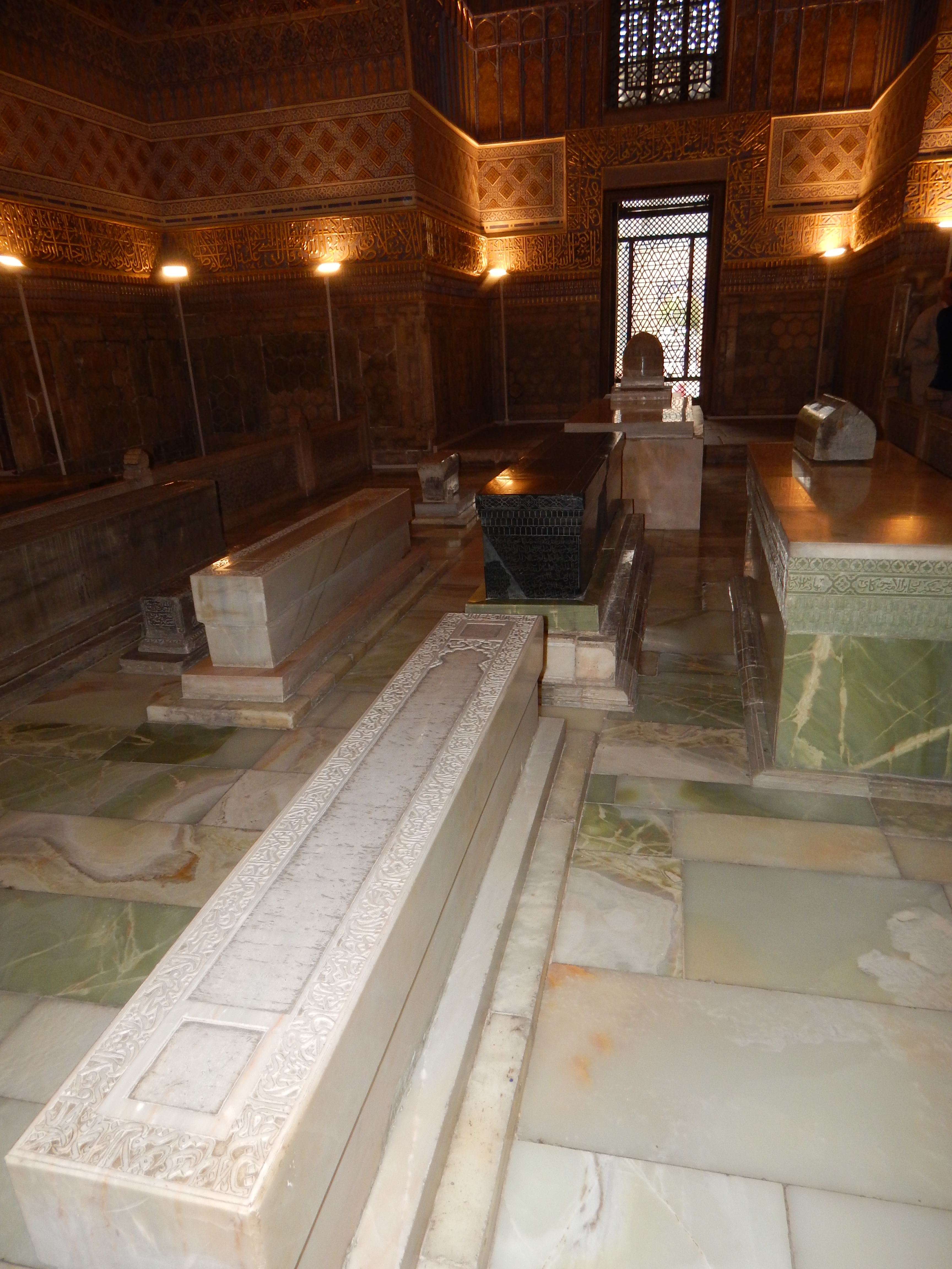 Могила Тамерлана в Гур Эмире — тёмное надгробие, 2016 год